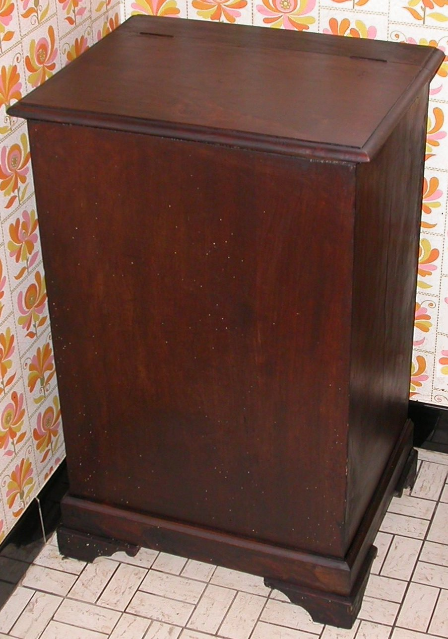 Huche à pain. Origine : Payré dans la Vienne. Dimensions : H=78 L=48 P=38 cm